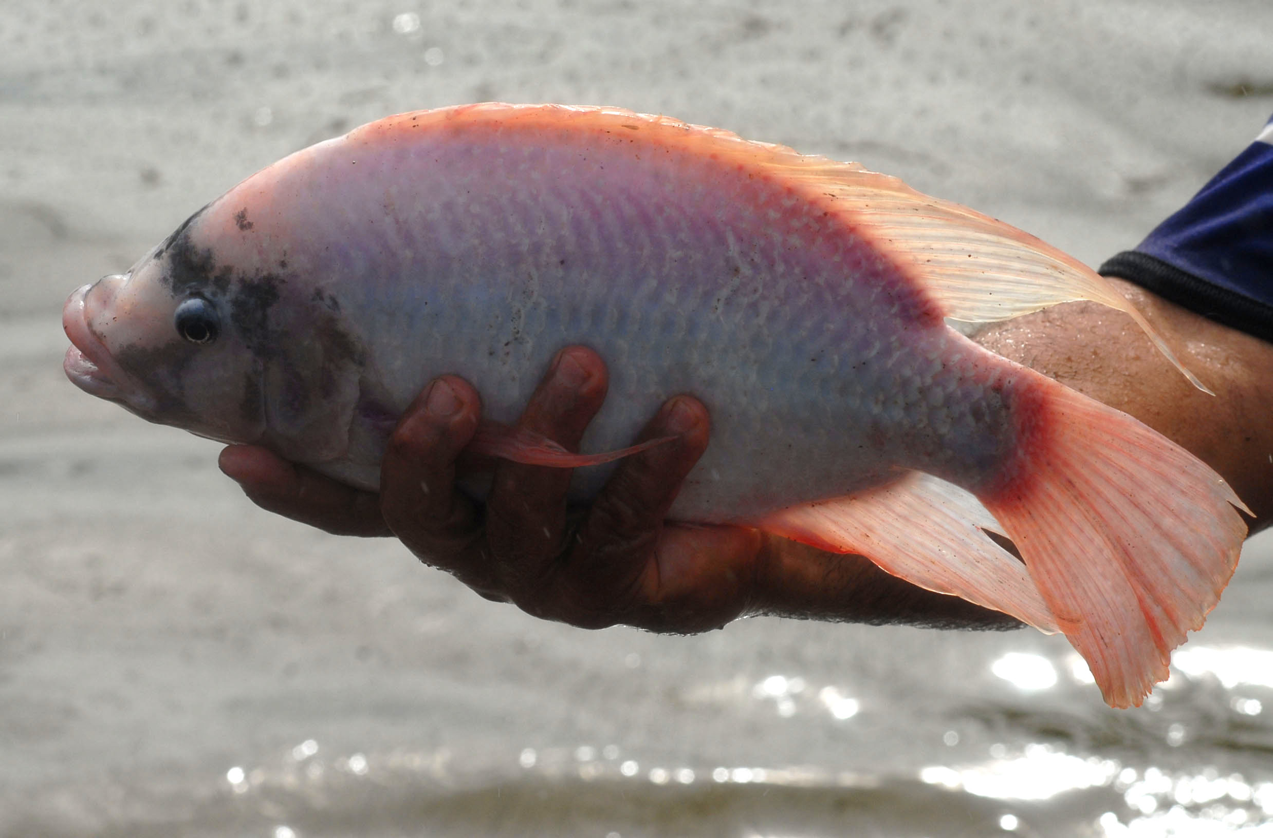 Imagem de uma tilápia em Brasília